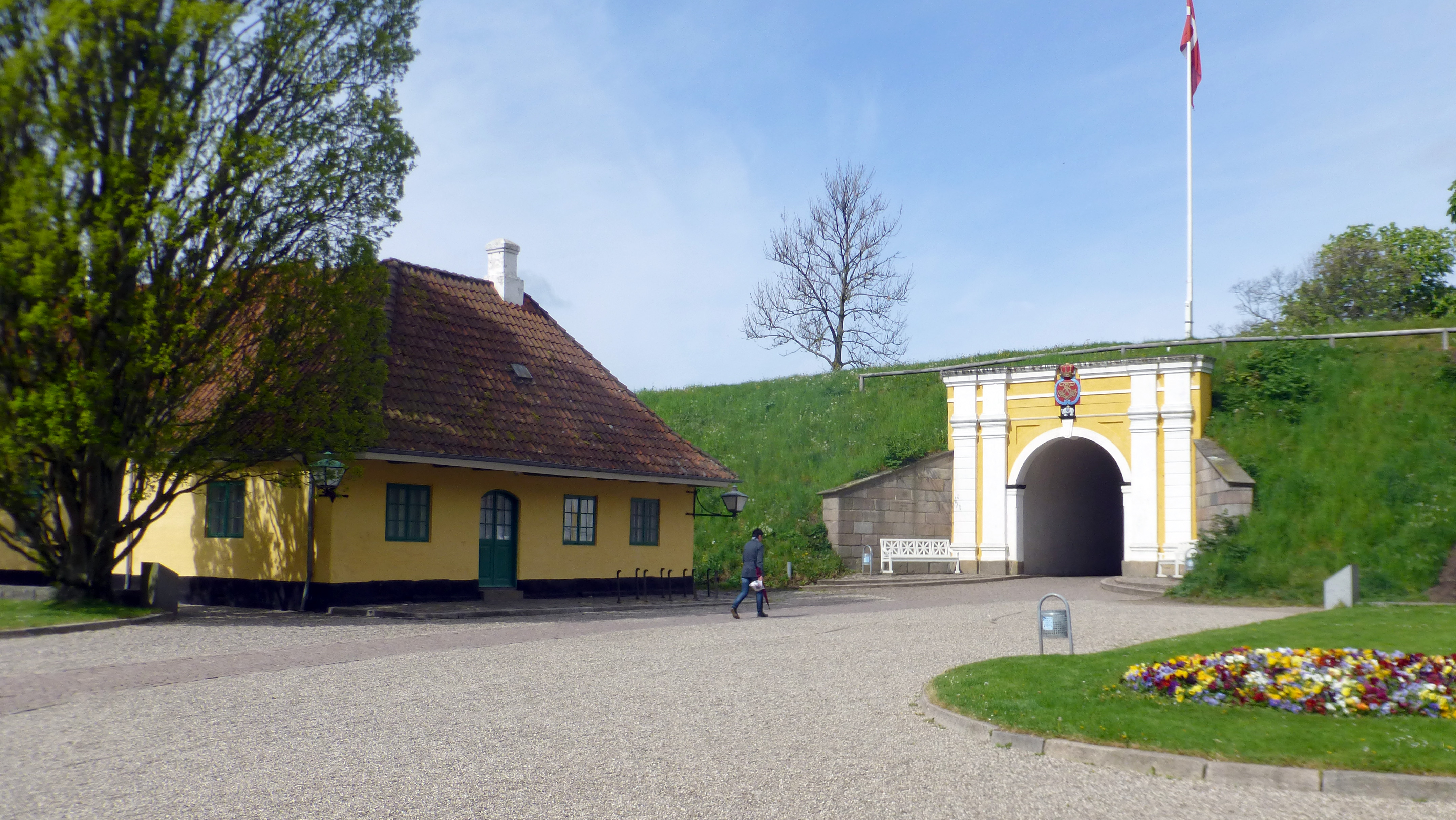 Hovedvagten og Prinsens Port ved Fredericia Vold